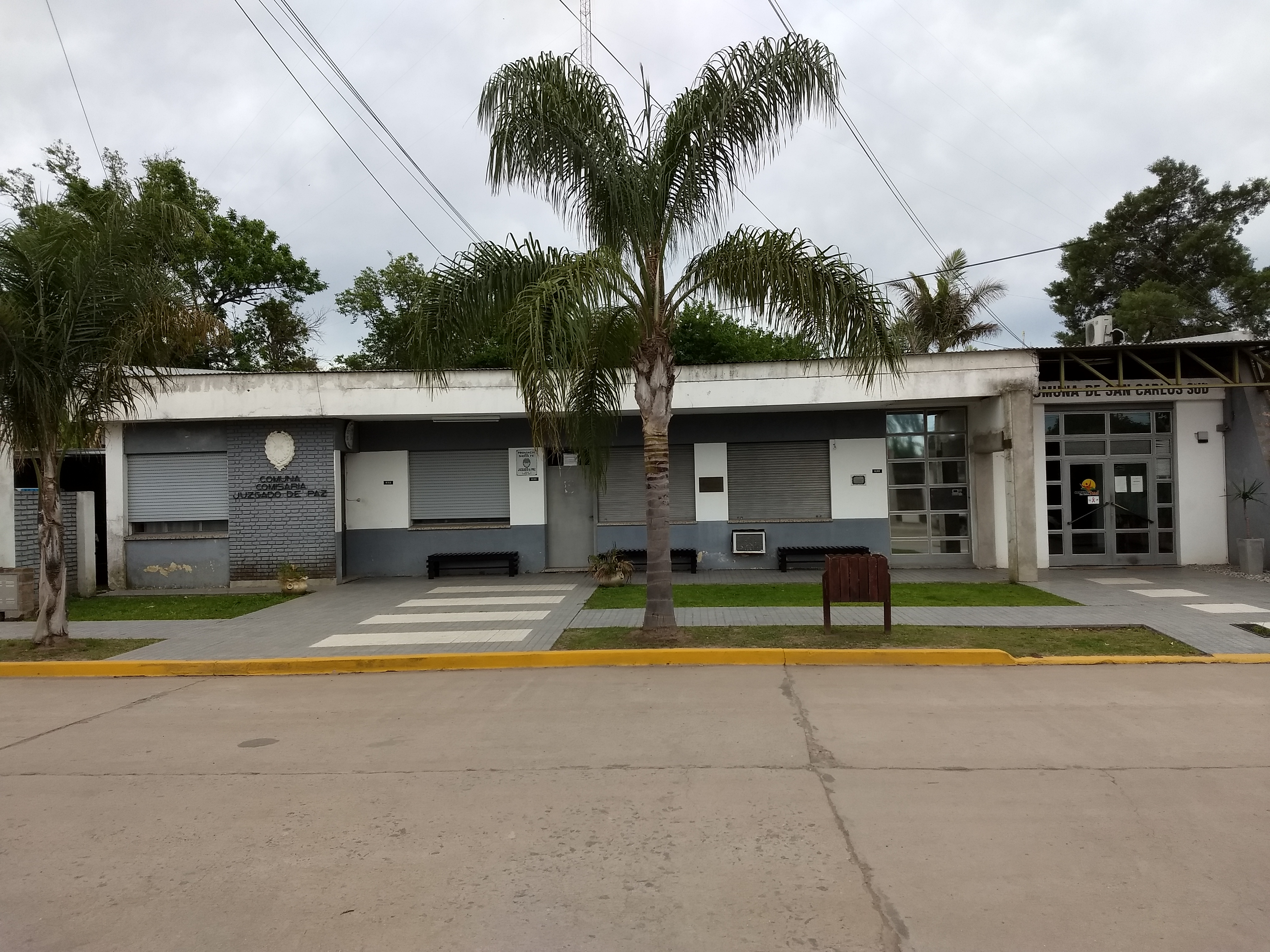 Comuna de San Carlos Sud, con la comisaría y juzgado de paz